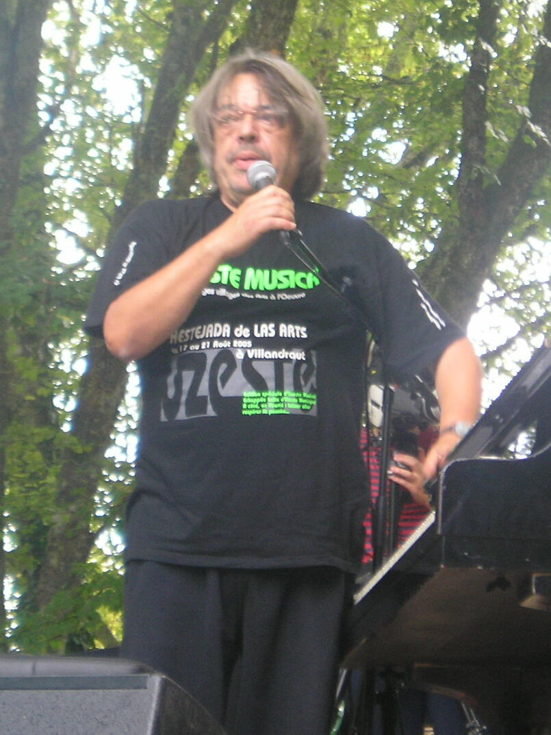 Bernard Lubat au festival d'Uzeste en 2006